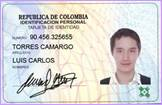 La Registraduría superó la cifra record de un millón de tarjetas de identidad azules en nuevo formato producidas para jóvenes entre 14 y 17 años. Aunque la obligación de renovar la tarjeta de identidad al cumplir los 14 años de edad data de 1971, en agoto de 2008 cambió el formato de los documentos y le incorporó características de seguridad similares a los de la cédula.